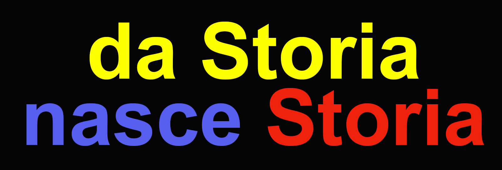 Titolo trasmissione